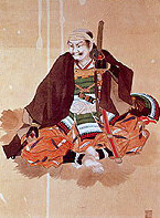 土屋昌続（松本楓湖作、恵林寺蔵）